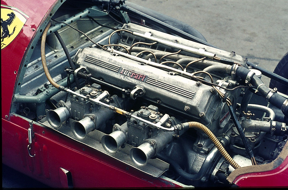 Ferrari 500 mit 2,5-Liter-Motor für 1954 beim Oldtimer-Grand-Prix des AvD auf dem Nürburgring